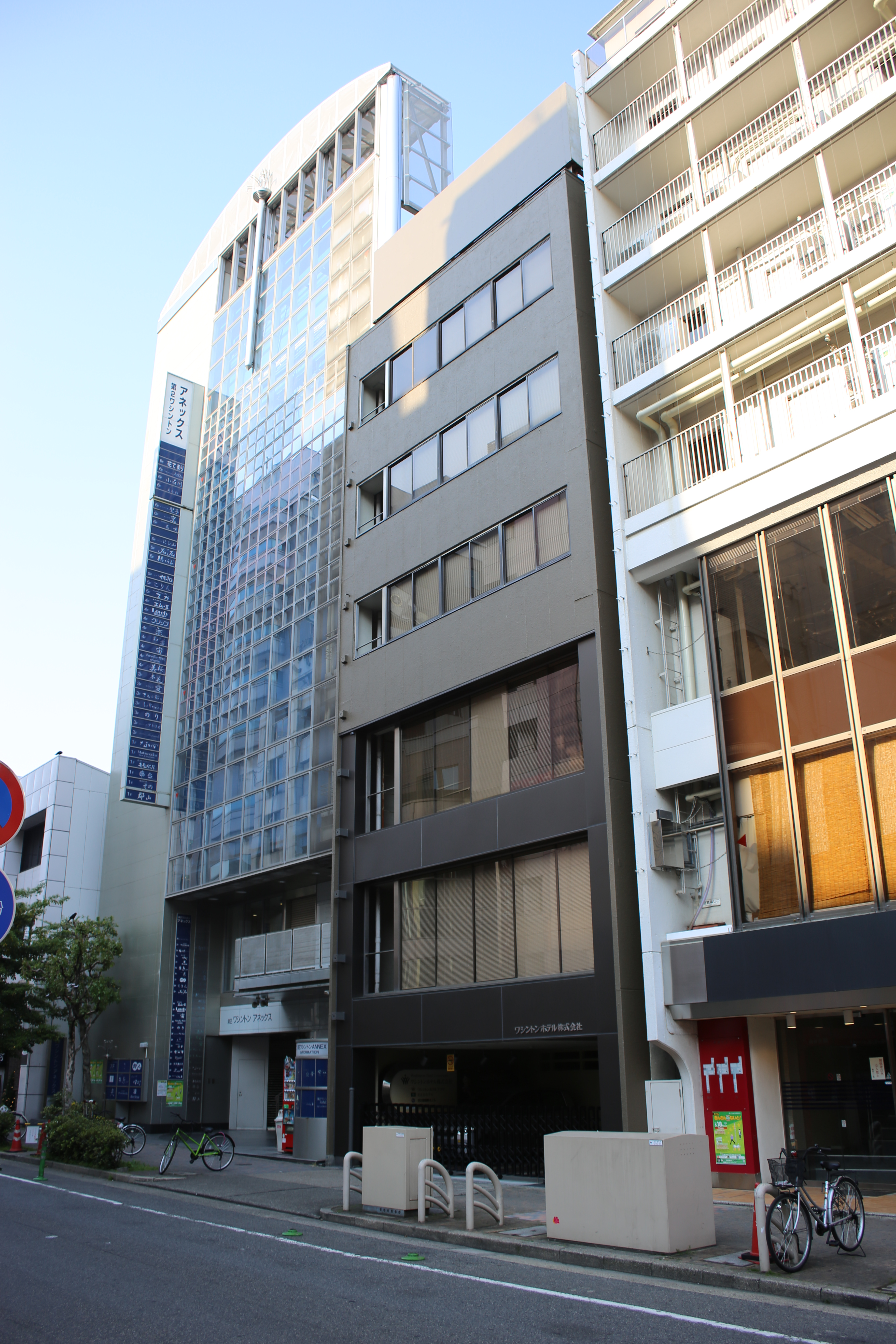 名古屋市中区錦三丁目にあるワシントンホテル本社を西側公道南側より撮影